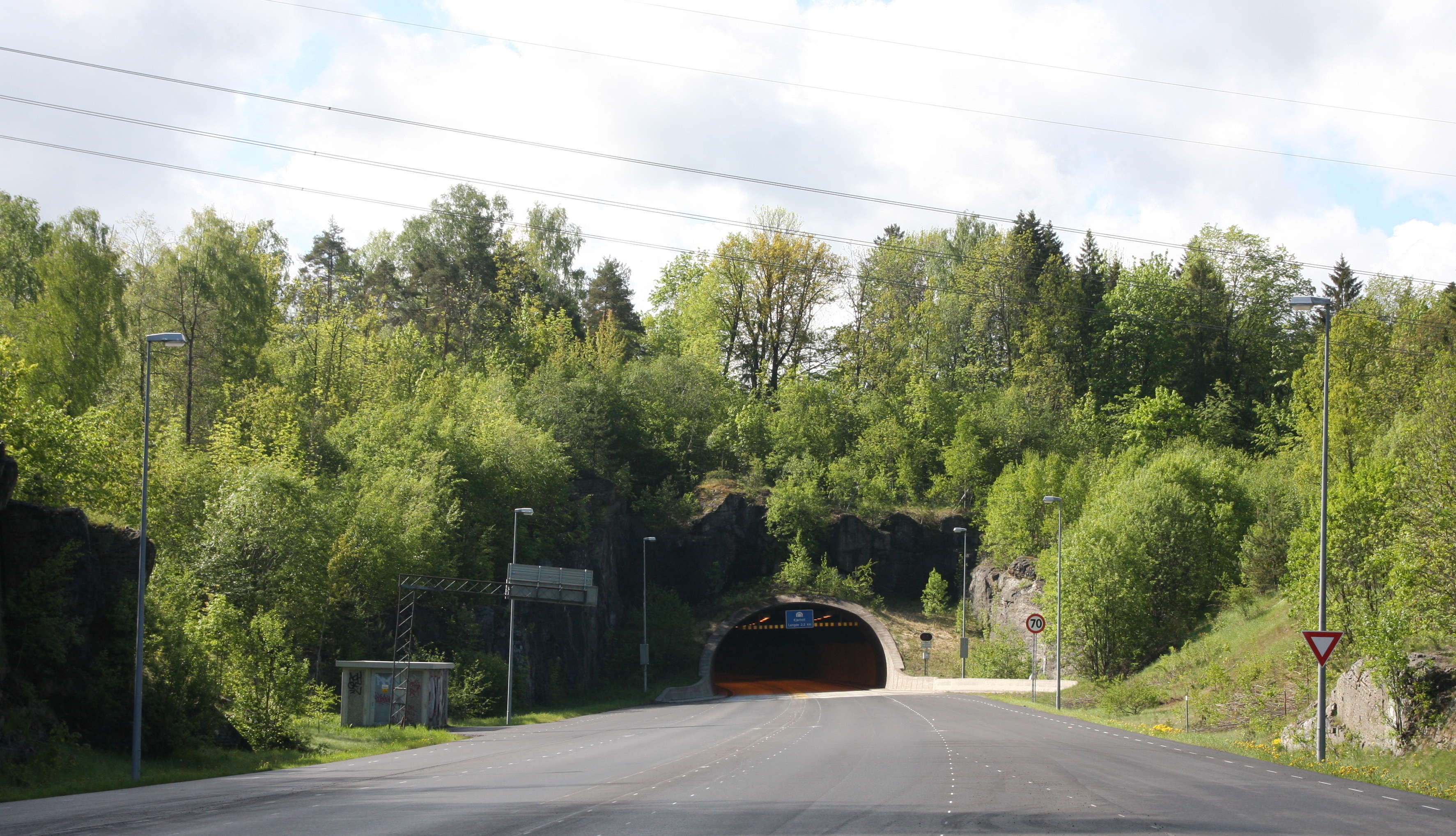 Kjørholttunnelen